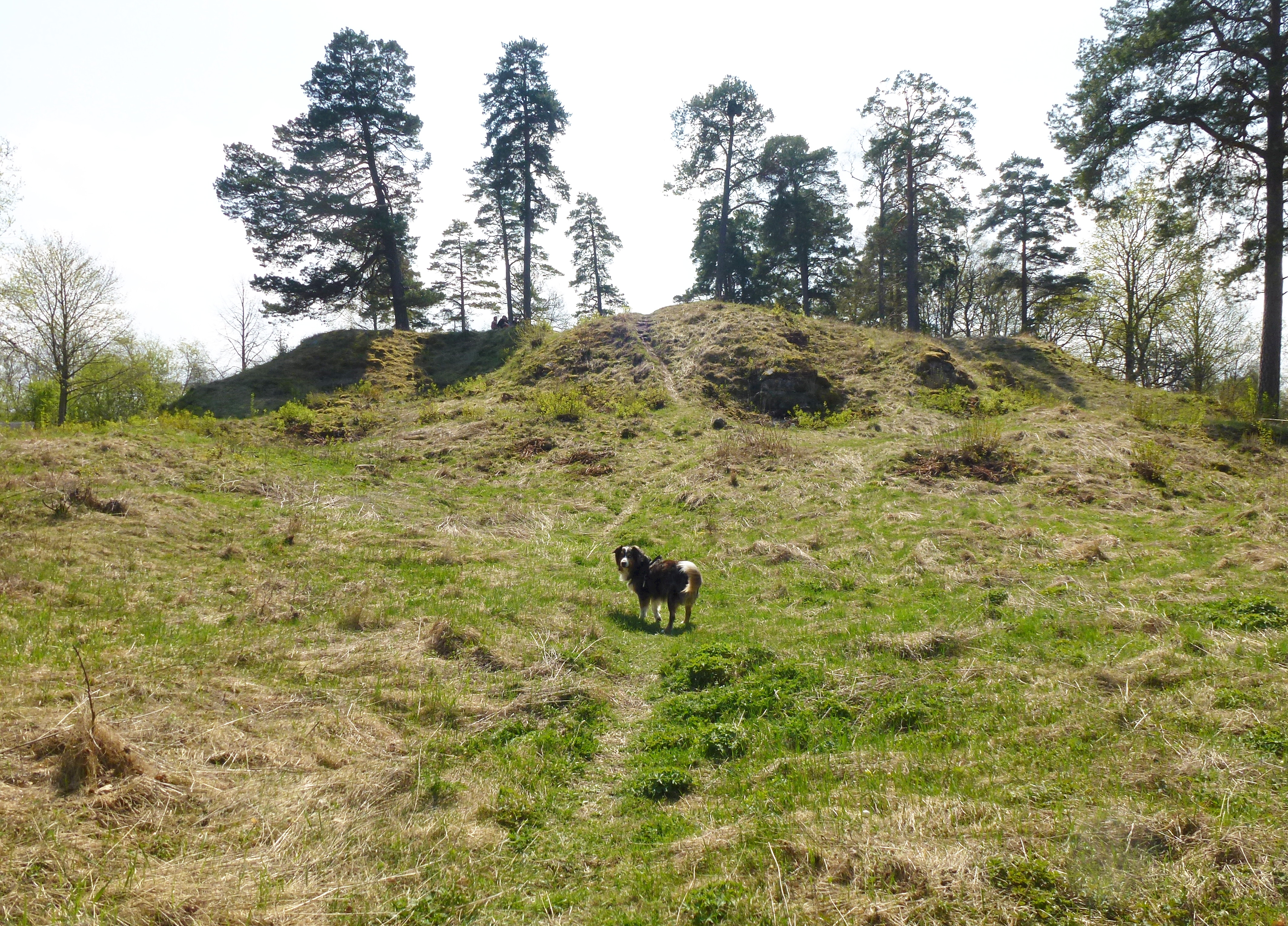 Biskopsborgen Almare-Stäket ruin